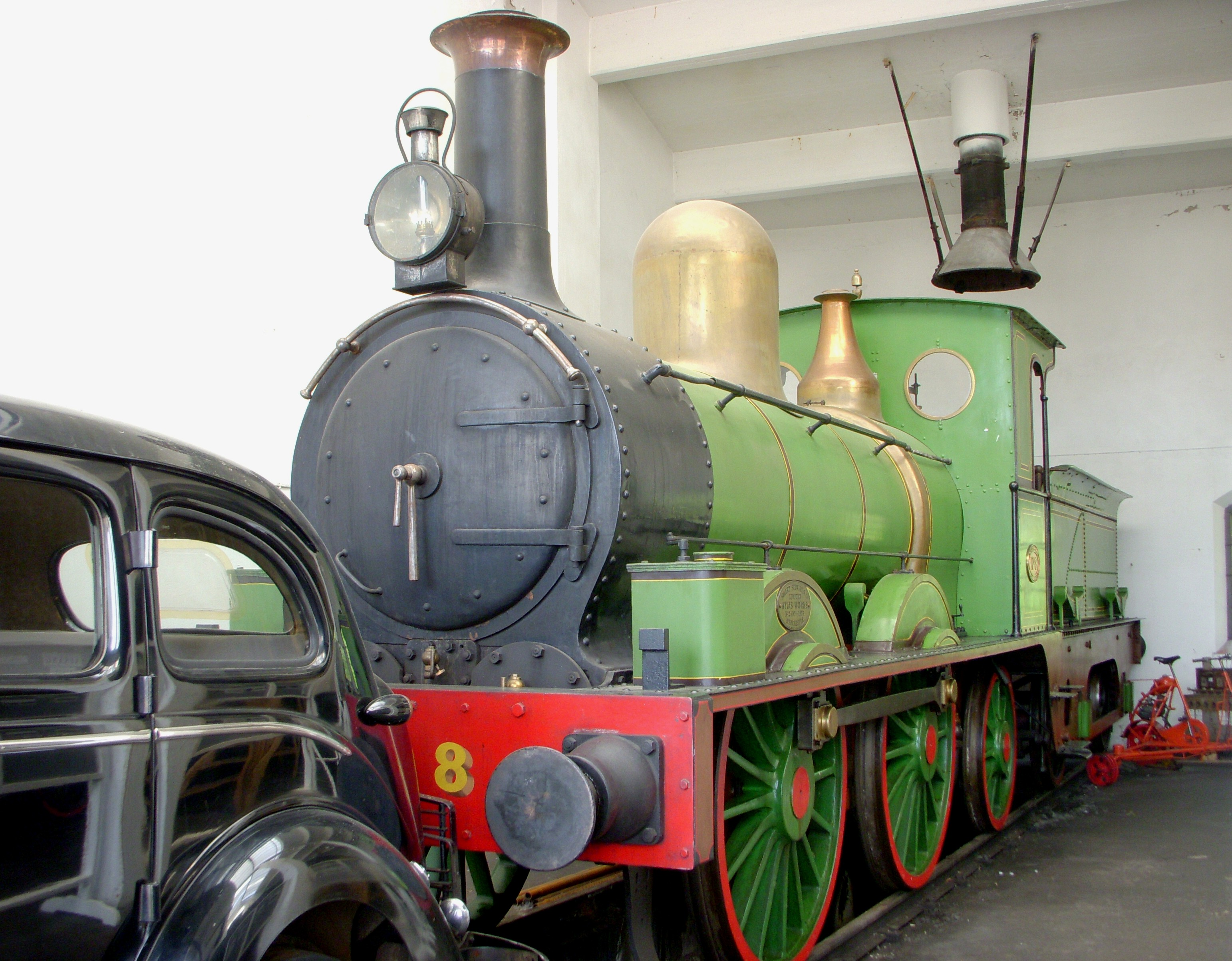 Lokmuseet i Grängesberg. OFWJ ånglok nr 8. Tillverkat av Sharp, Stewart & Co, Manchester, 1876.